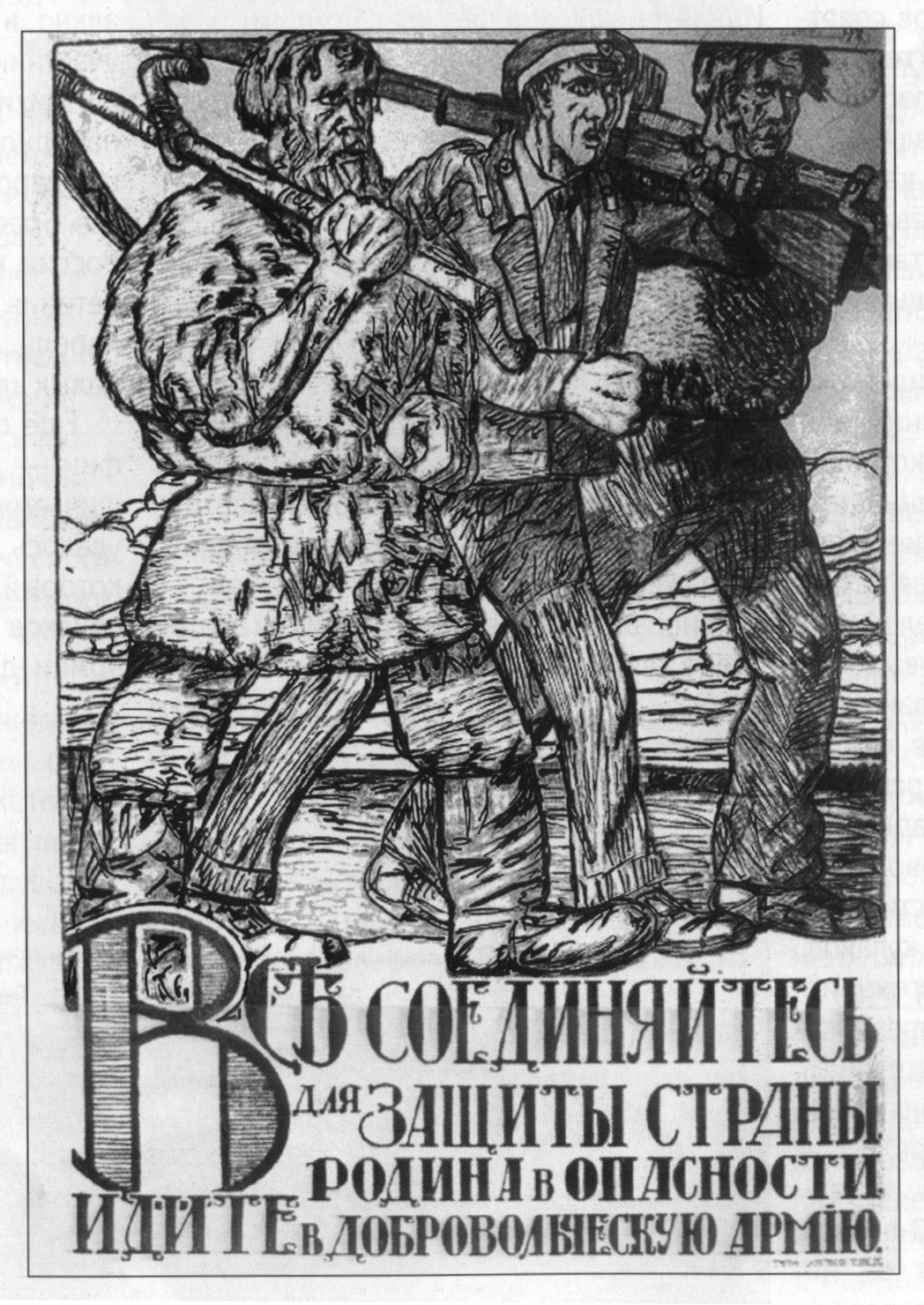 Плакат с призывом вступать в Добровольческую армию. Осведомительное агентство Юга России.